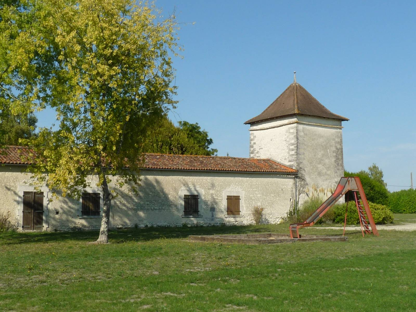 la Grave, Gimeux (16), France